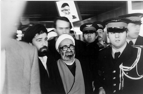 Montazeri &khomeyni